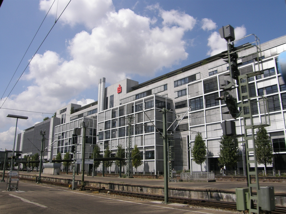 Das Gebäude der LBBW uns Sparkasse in Stuttgart am Hauptbahnhof